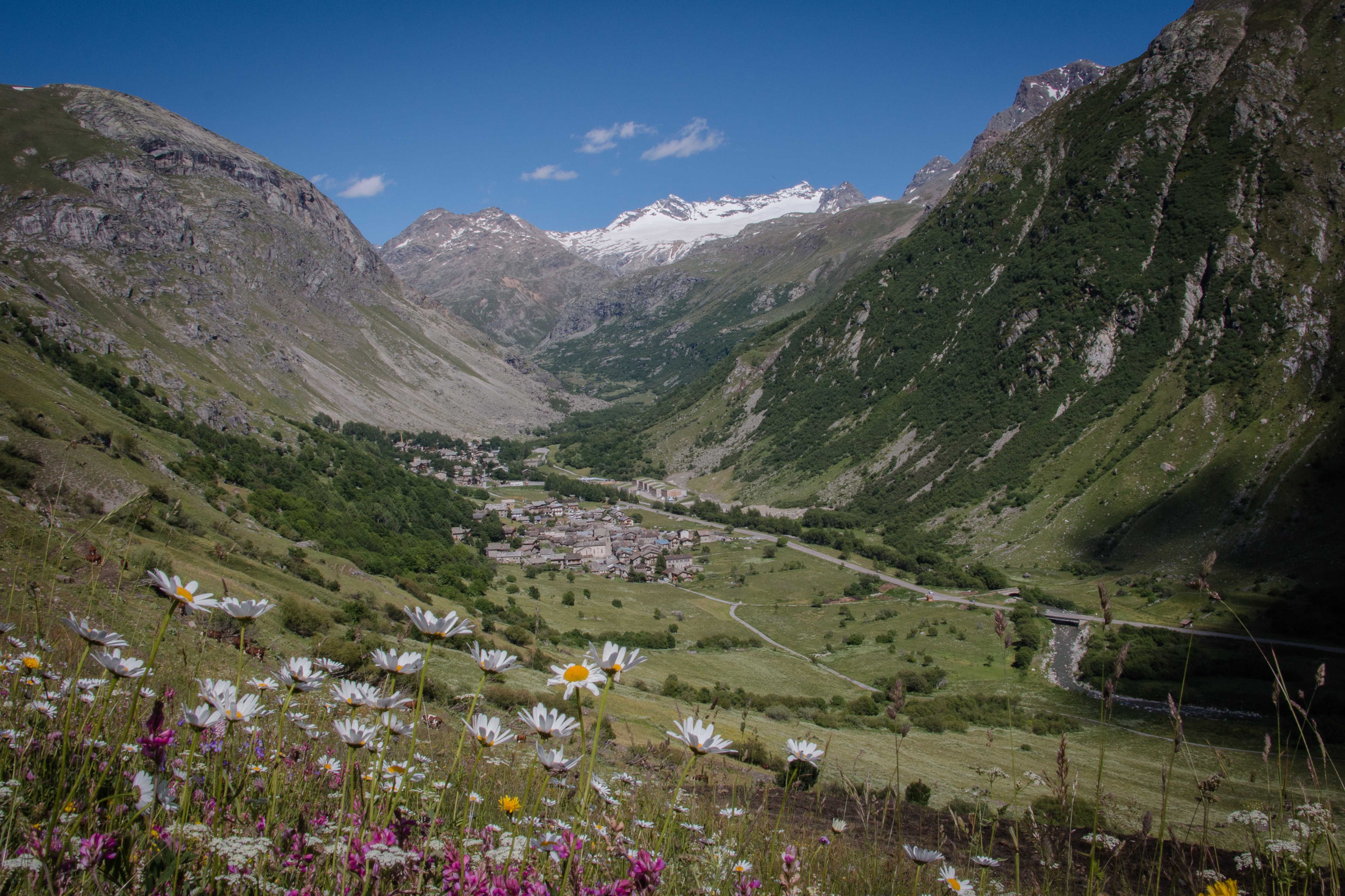 village au cœur de magnifiques montagnes